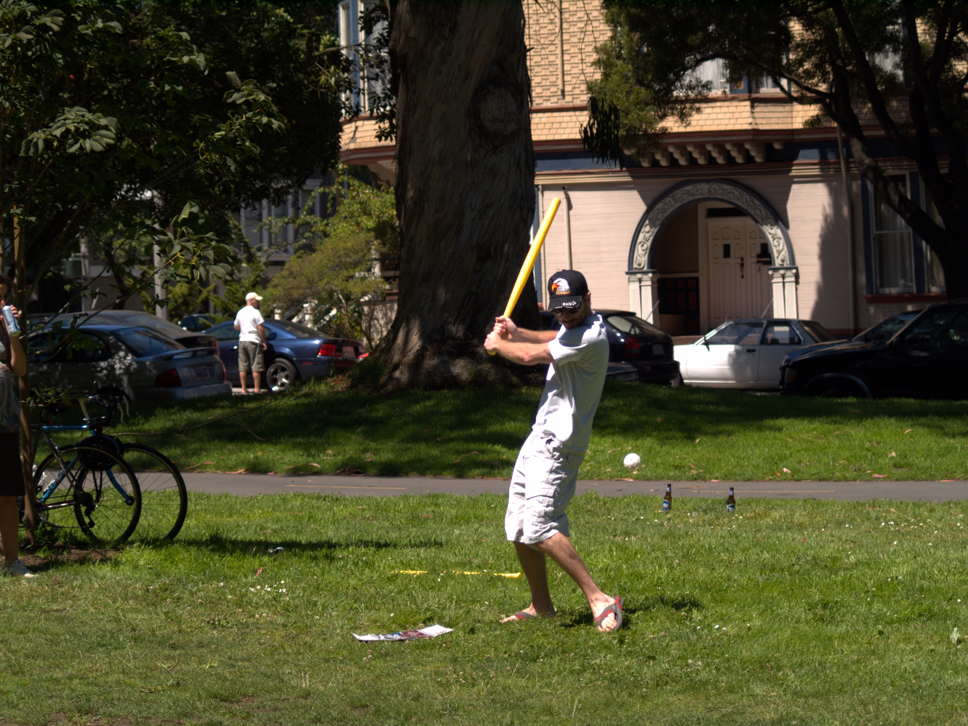 P8235336.ORF